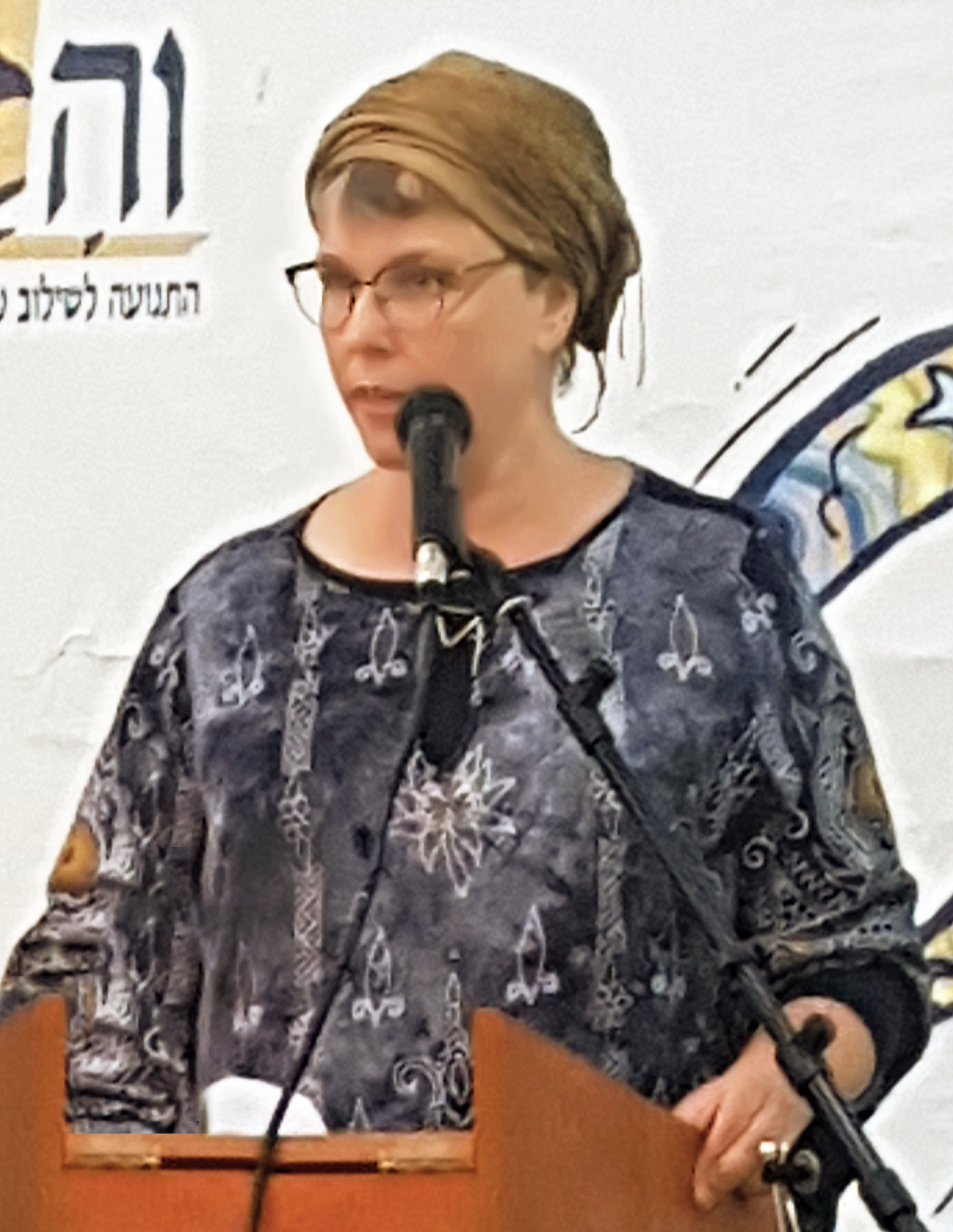 מיכל נגן